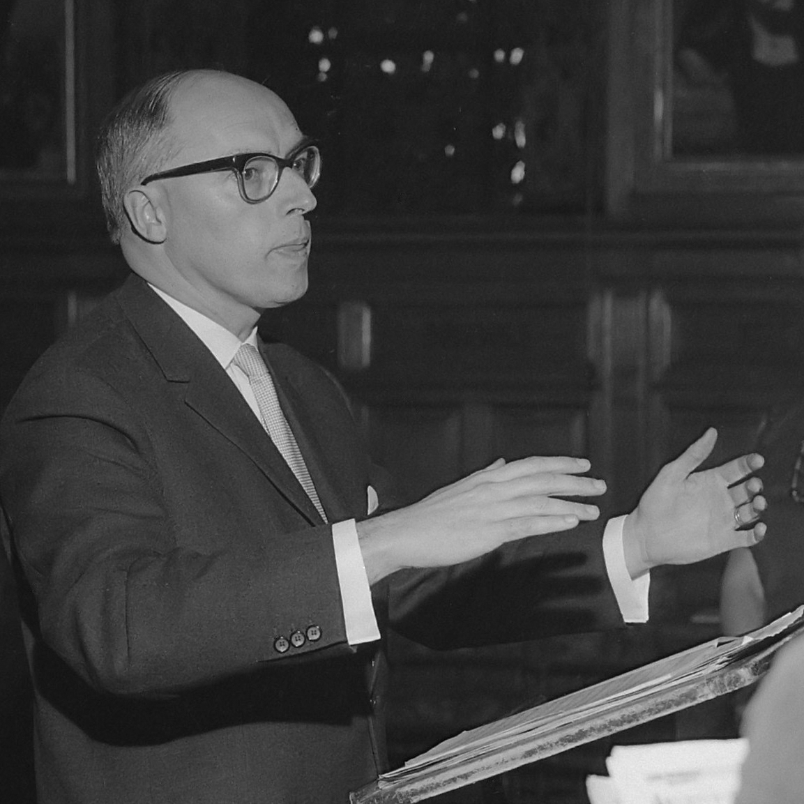 Uitreiking prijs voor schone kunsten aan de musicus louis Toebosch , rechts de Commissaris van de Koningin Noord-Brabant, dr. C.N.M. Kortmann 16 november 1962